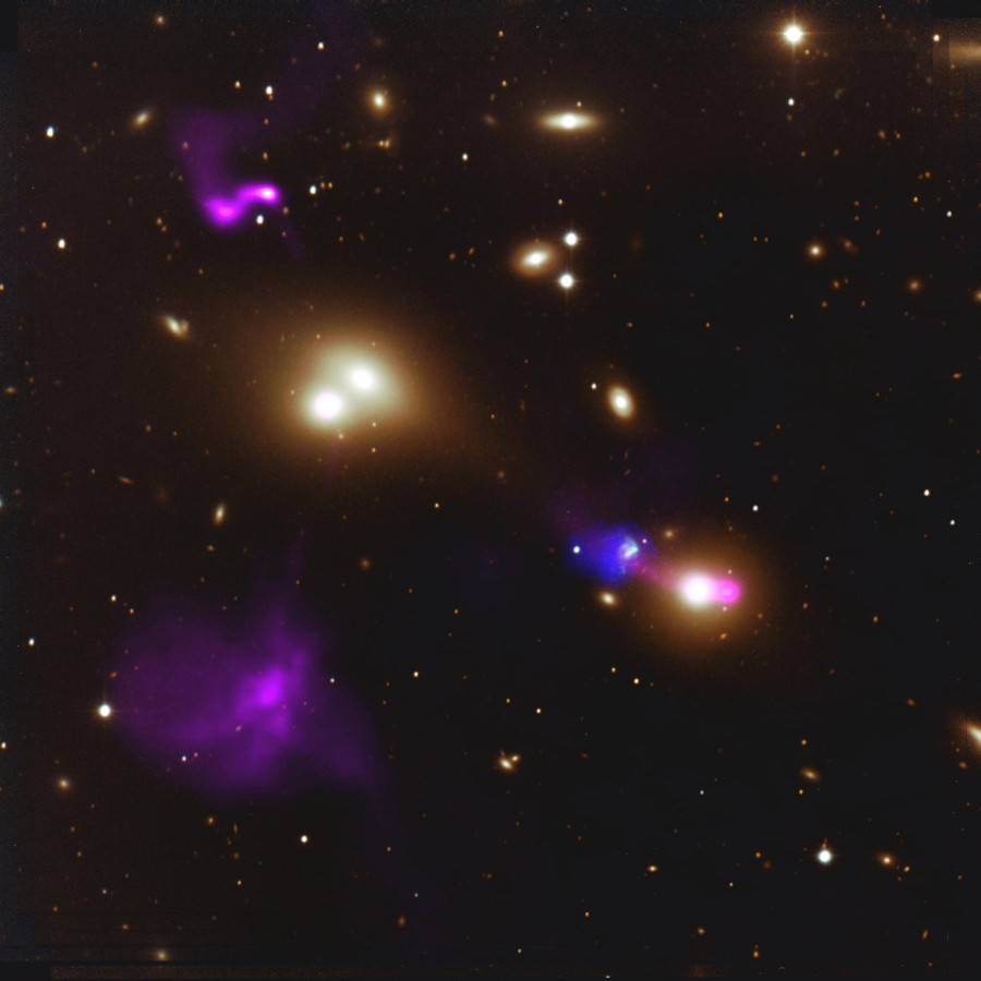 Les galaxie NGC 545 et NGC 547 en interaction. Le texte du NRAO: This image of the cluster of galaxies known as Abell 194 shows two radio galaxies shooting out huge, powerful jets of material from the regions surrounding the black holes at the galaxies' centers. These jets are visible in the radio data from the VLA telescope, shown in purple, overlaid on the color image of the cluster from the Lick Observatory 120-inch telescope. The jets from the interacting galaxies known as NGC 545 and NGC 547 (center left) extend for some 250,000 light years (one light year is around 6 trillion miles - the distance light travels in one year). The shorter jet from the galaxy NGC 541 (lower right) collides with a cloud of hydrogen gas, shown here in dark blue (also detected via its radio emission using the VLA). The pressure from the jet triggers the collapse of blobs of gas within this cloud, which form stars (seen in the light from excited hydrogen atoms, which are shown in this image as a light blue overlay from data from the 2.3-m telescope at Siding Spring in Australia). This unusual star forming system is known as Minkowski's Object, and is an example of black holes bringing new life (in the form of baby stars) to the Universe, when cosmic collisions between their outflowing jets and surrounding gas trigger the gas to collapse.